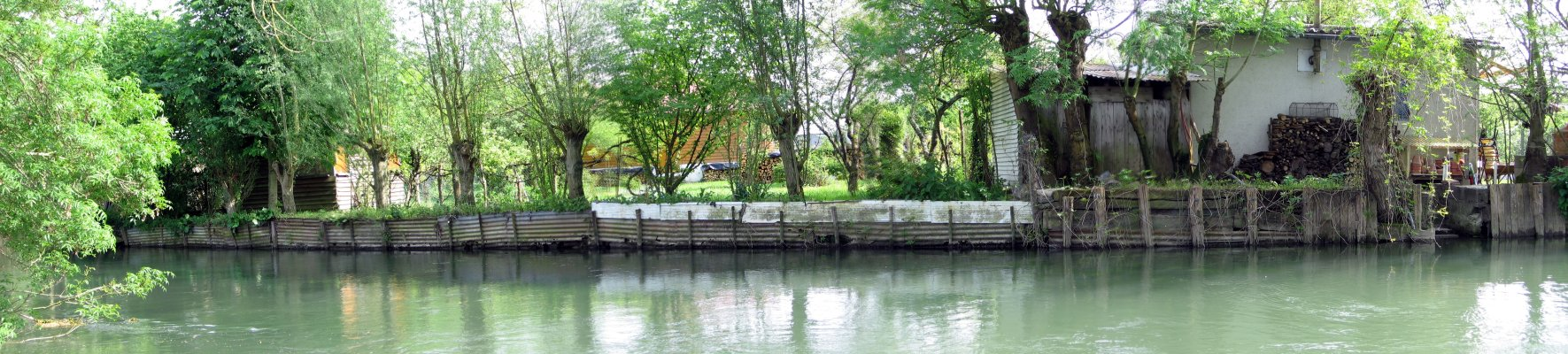 Les Marais l'Yèvre et de la Voiselle (Villes de Bourges), Photo prise en mai 2005 Par Utilisateur:Norman sous GNU FDL Utilisateur:Norman